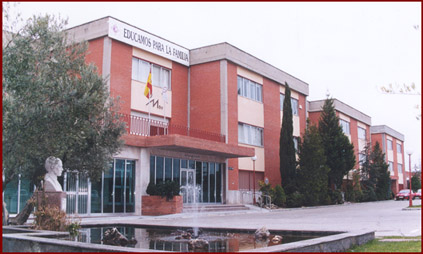 CPManyanet